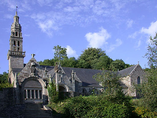 Châteaulin (finistère) - La chapelle Notre-Dame